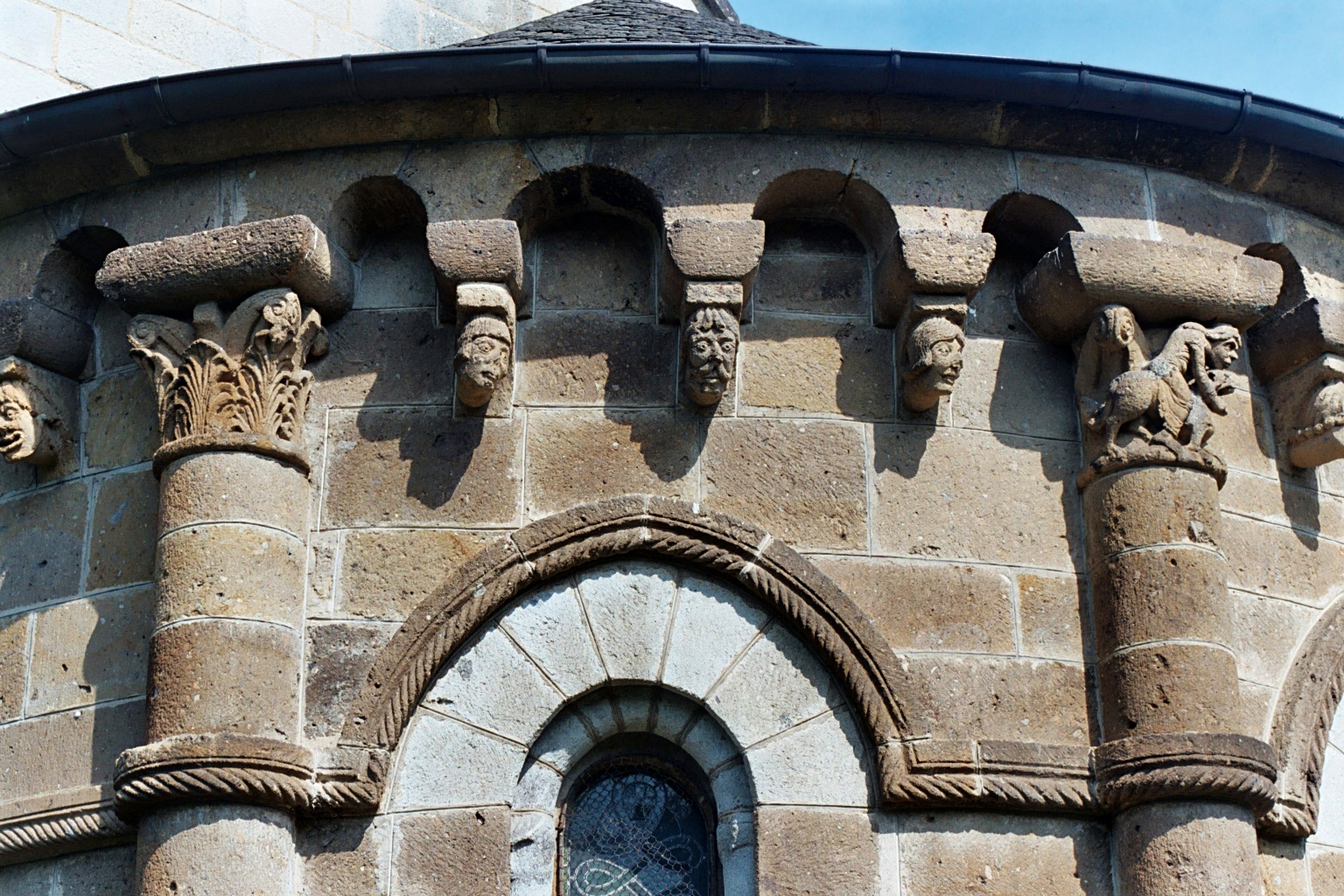 France - Auvergne - Cantal - Église Saint-Georges d'Ydes-Bourg